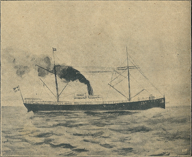 Damperen "Chr. Broberg" fra "De forenede". Den var på vej hjem fra forskellige Middelhavshavne med stykgods da den danske damper "Maryland" stødte på en mine 35 kvartmil fra Galopernes fyrskib d. 21. august 1914. "Chr. Broberg" sejlede til derhen for at komme mandskabet til hjælp da dette skib også stødte på en mine. Hele mandskabet, bortset fra 2. maskinmester Jensen som omkom, nåede i redningsbådene inden skibet forsvandt i dybet.